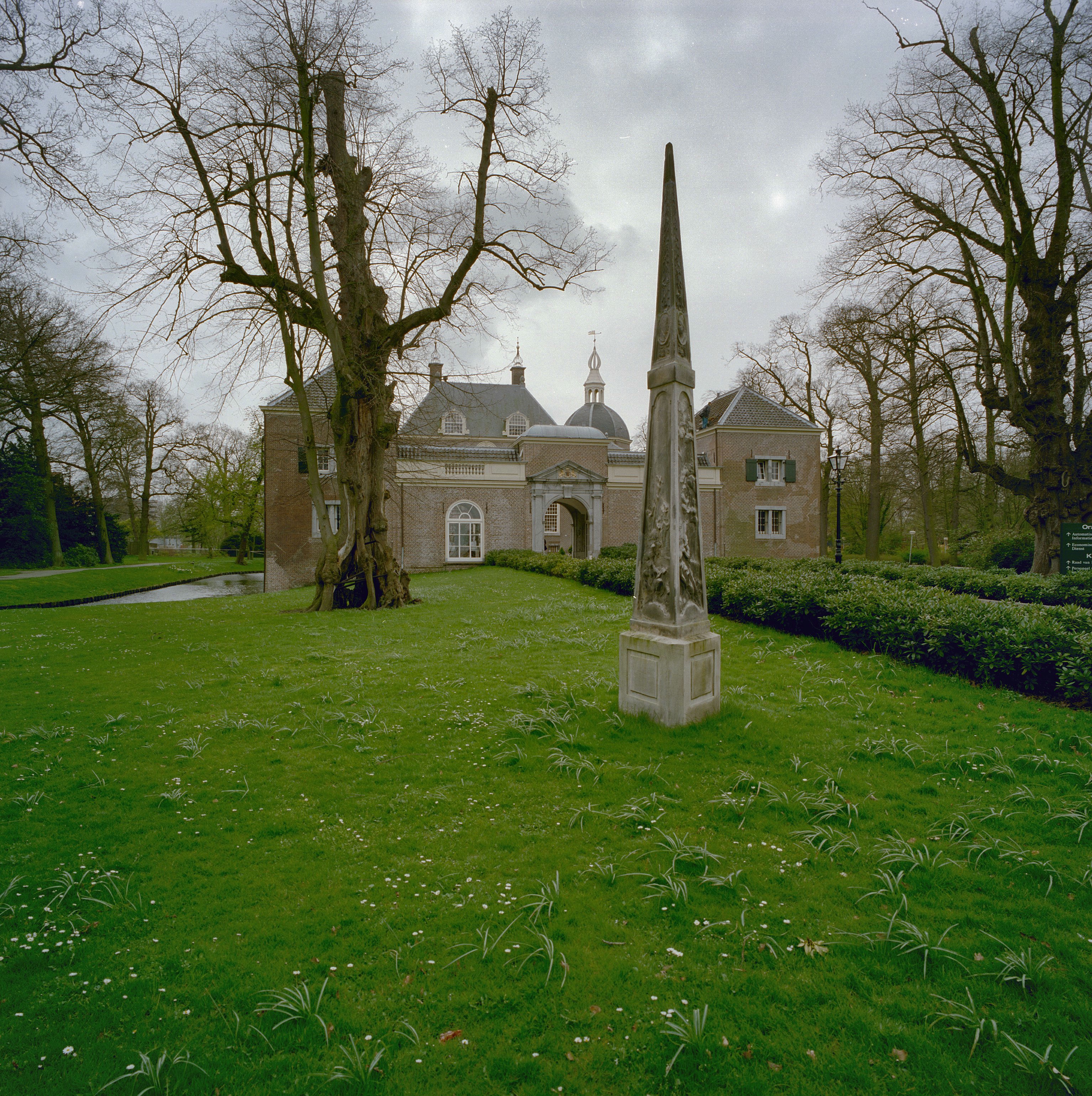 Kasteel Endegeest: Overzicht voorgevel voorgebouw met toegangspoort en obelisk op de voorgrond (opmerking: Gefotografeerd voor Kastelen en Buitenplaatsen in Zuid-Holland)